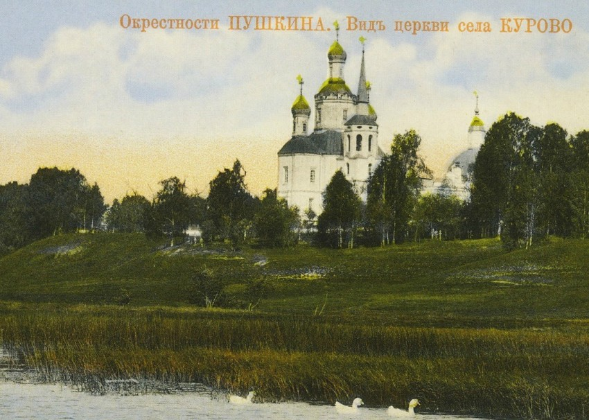 Типично украинский по структуре Знаменский храм в подмосковном Курове боярина А.С. Шеина. Построен в 1681-87 гг., снесён в 1931 г.